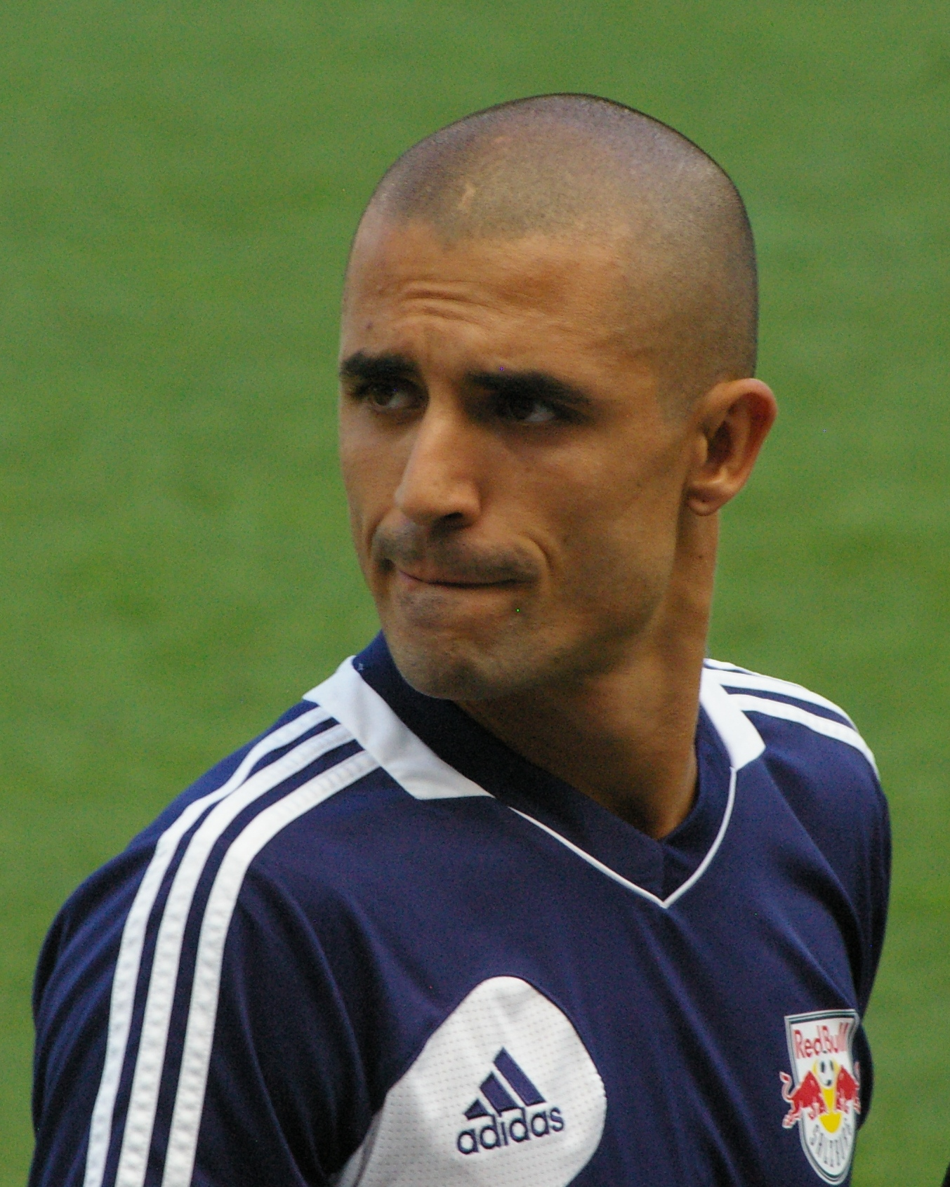 defender RB Salzburg